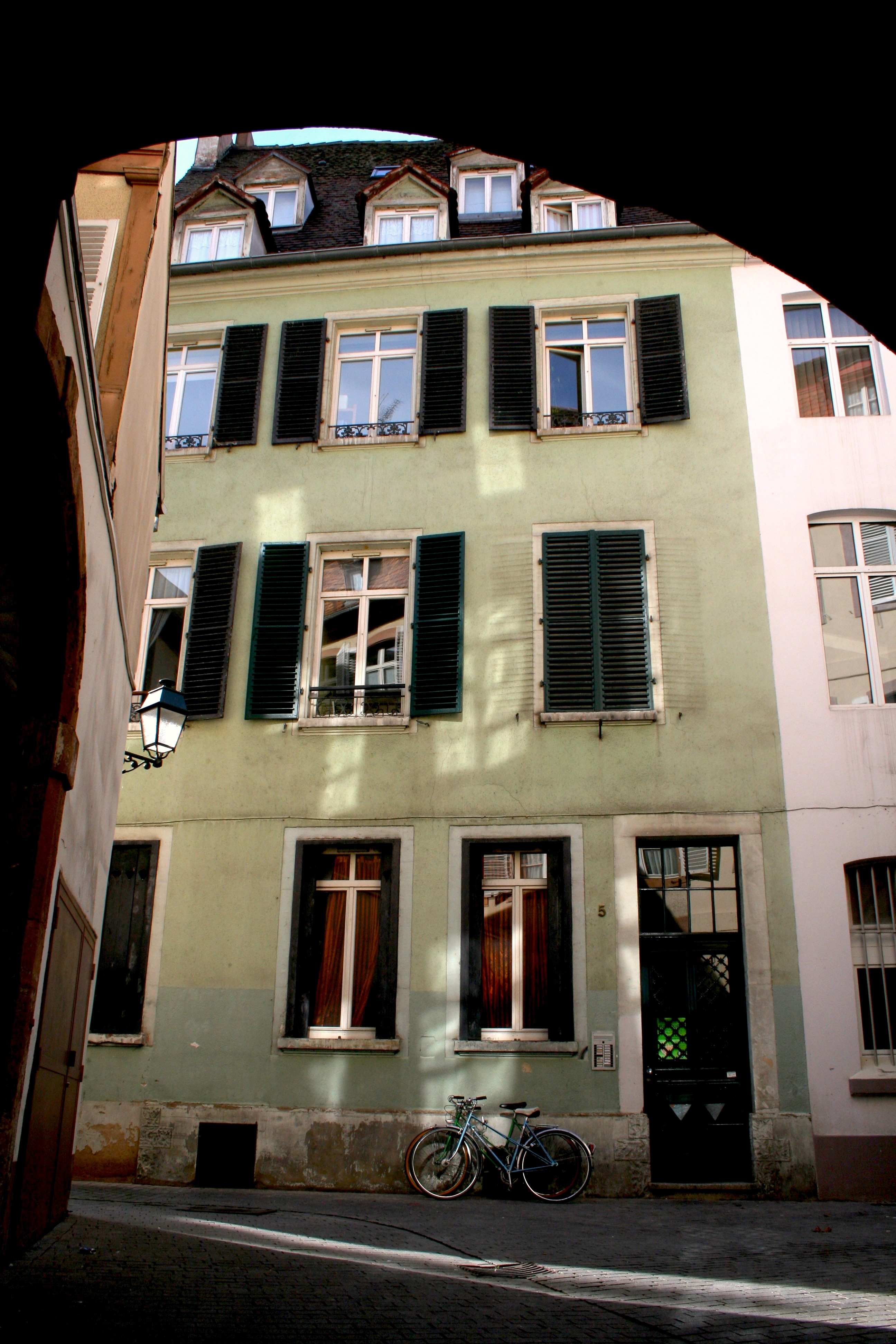 Strasbourg, 5 rue du Ciel, immeuble où furent fondées les Diaconesses de Strasbourg le le 31 octobre 1842.